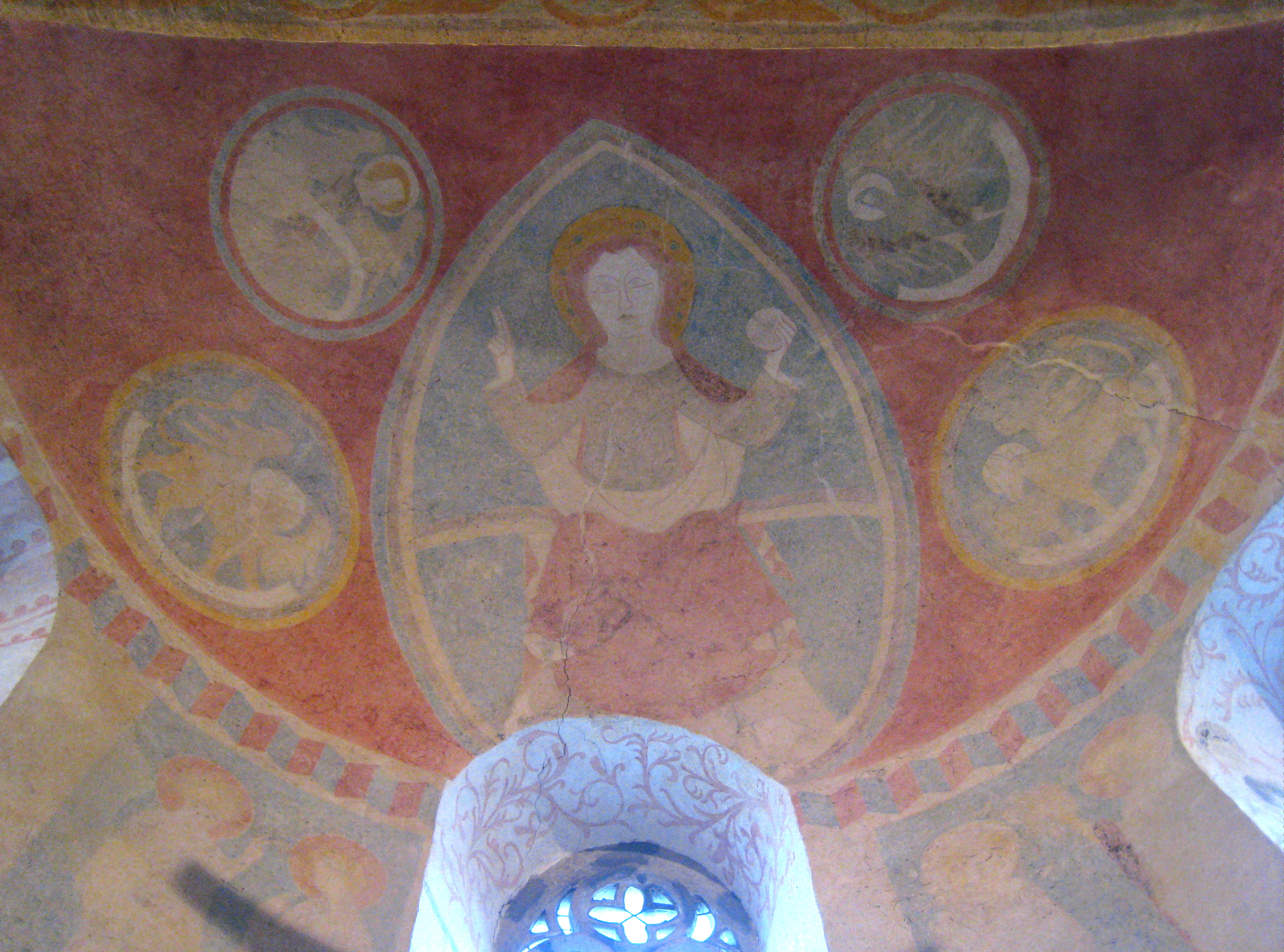 Darstellung der Majestas domini und der vier Evangelistensymbole in der ChorapsisThis is a photograph of an architectural monument.